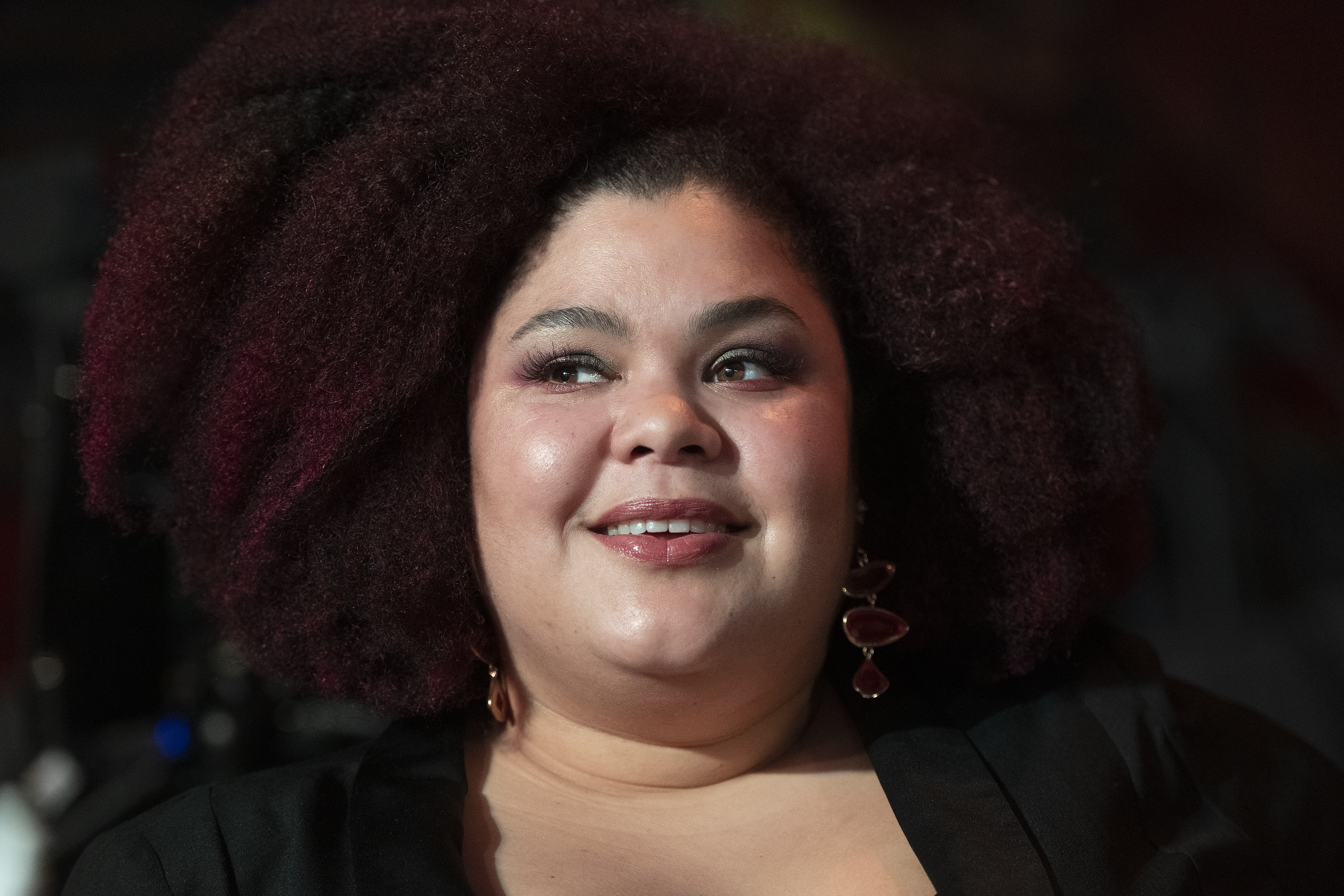 Loulou Lamotte intervjuas inför Melodifestivalen 2020 Linköping